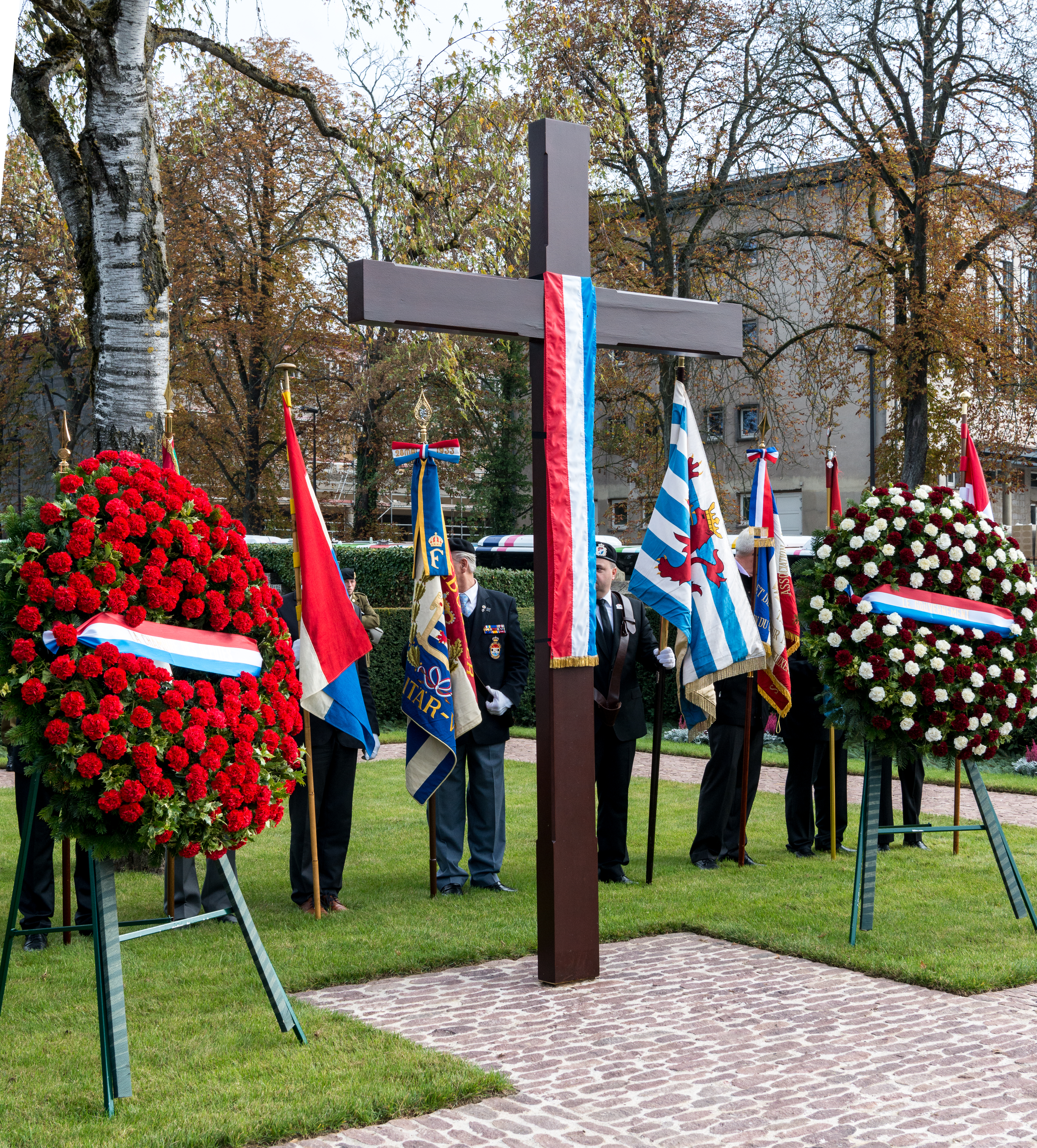 D'Journée de la commémoration nationale erënnert un d'Lutte vum Lëtzebuerger Vollek géint d'Nazi-Okkupatioun am Zweete Weltkrich. D'Commemoratioun ass am Oktober, um Sonnden deen am notse beim 10. Oktober läit. Se erënnert domat un den Echec vun der Personenstandsaufnahme vum 10. Oktober 1941. Feierlechkeete ginn a ville Gemengen ofgehal, an der Stad Lëtzebuerg sinn et der gläich dräi: Beim Nationalmonument vun der Lëtzebuerger Solidaritéit um Kanounenhiwwel, bei der Gëlle Fra op der Constitutiounsplaz a beim Hinzerter Kräiz um Nikloskierfecht. No de Feierlechkeeten um Kanounenhiwwel a bei der Gëlle Fra gouf den 9. Oktober 2016 eng weider Zeremonie beim Hinzerter Kräiz ofgehalen. Nom Discours vum Xavier Bettel hu Vetrieder vun der kathoulescher an der protestantescher Kierch eng Ried gehalen an de Groussrabbiner huet de Kaddish gebiet. Kränz goufen vum Chamberpresident Mars Di Bartolomeo, vum Premier Xavier Bettel a vun der Stater Buergermeeschtesch Lydie Polfer néiergeluecht.